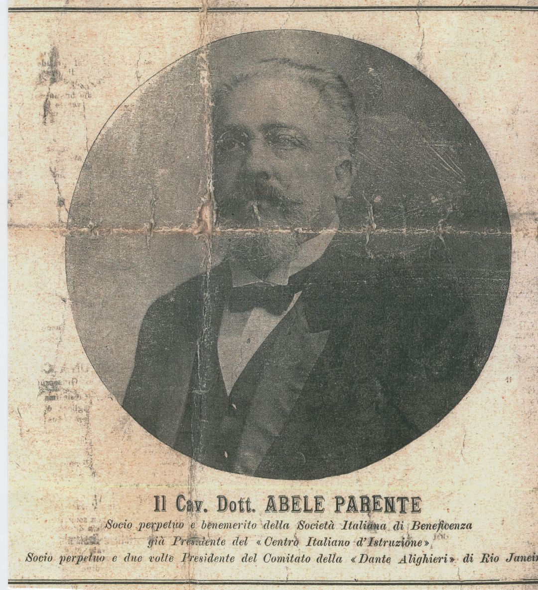 non coperto da copyright